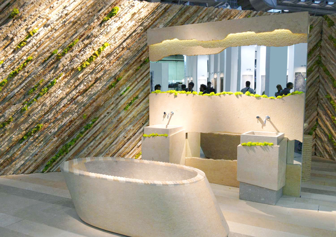 MARMOMACC 2012